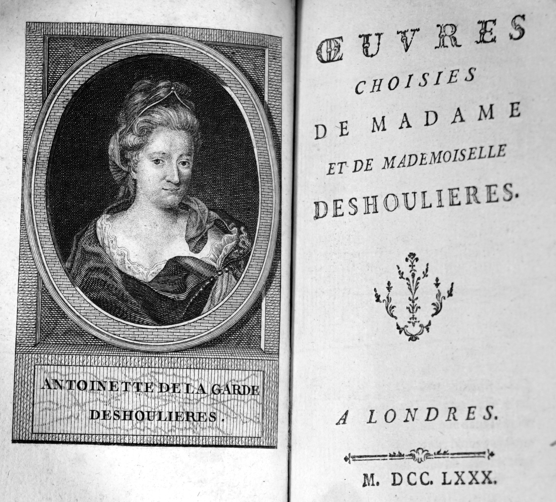 traduction de poèmes imprimés par Cazin.